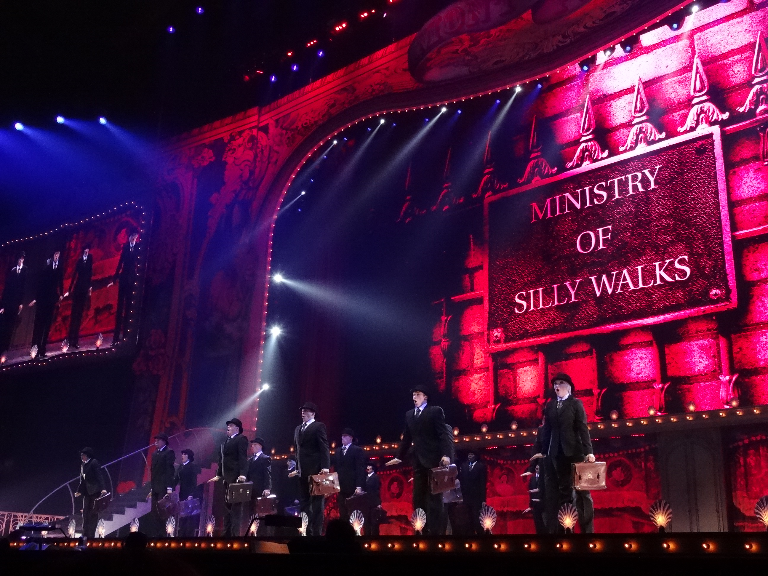 Photo 02-07-14 12 57 32